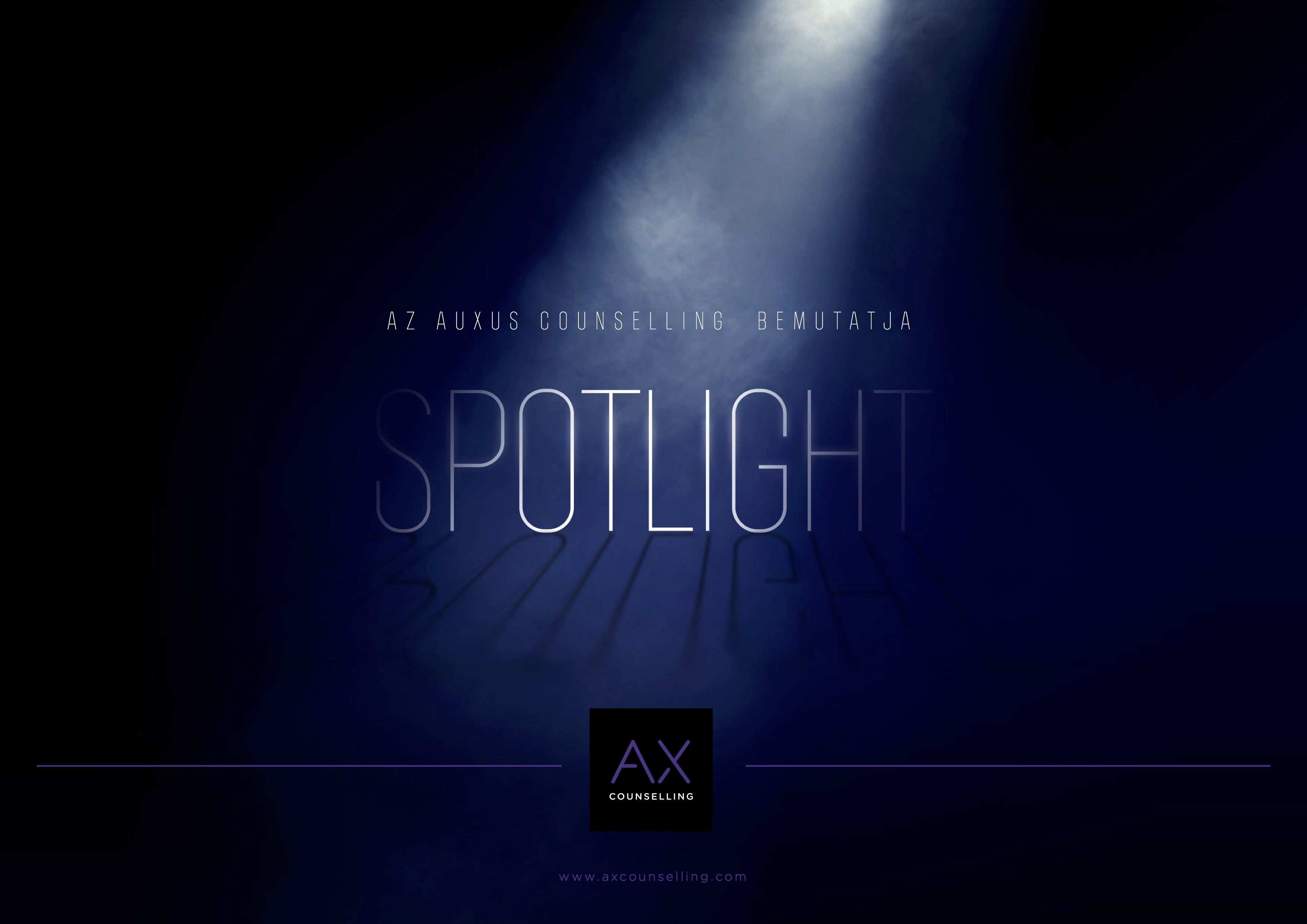 SPOTLIGHT_logo